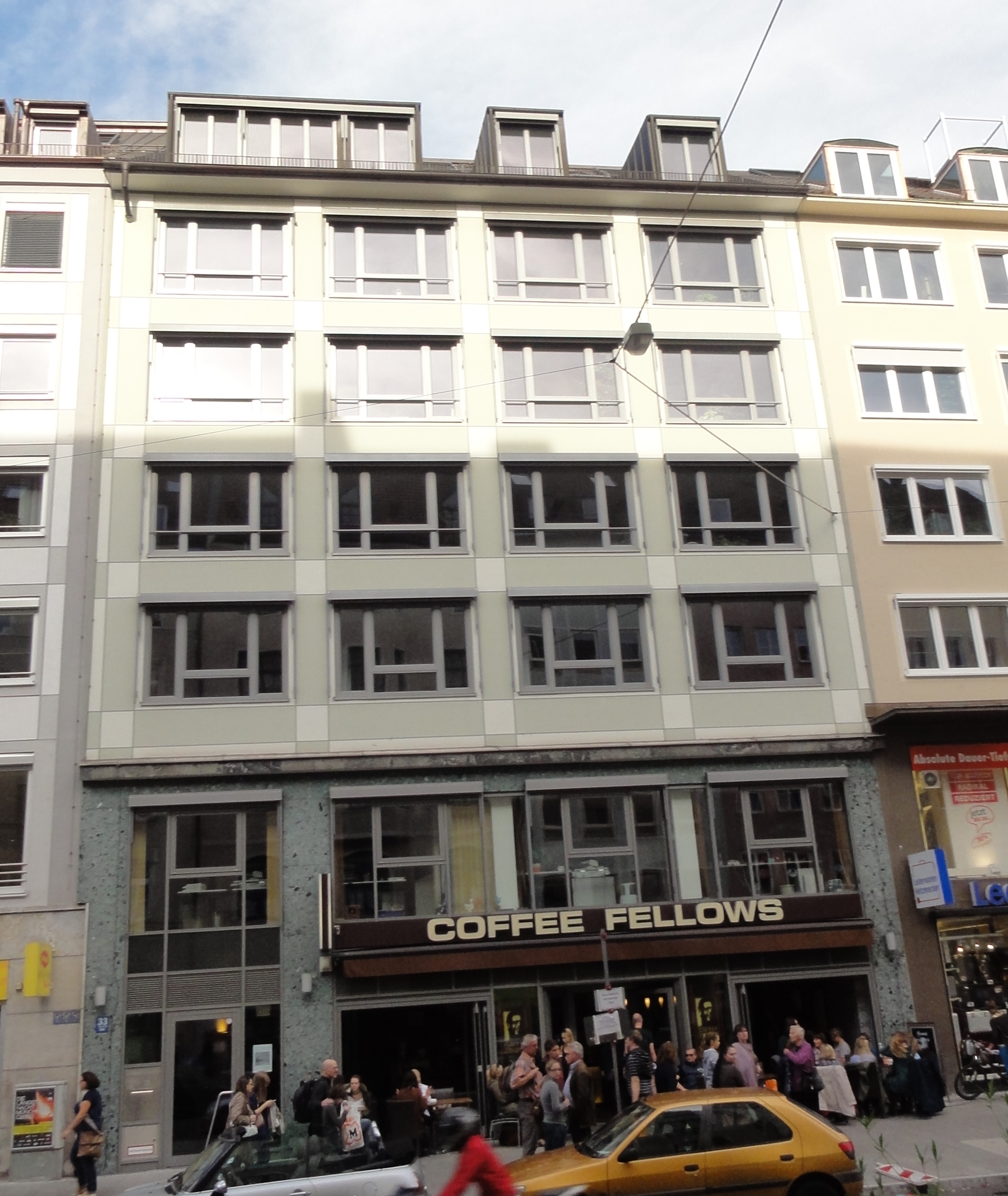 Munich, Tal 33